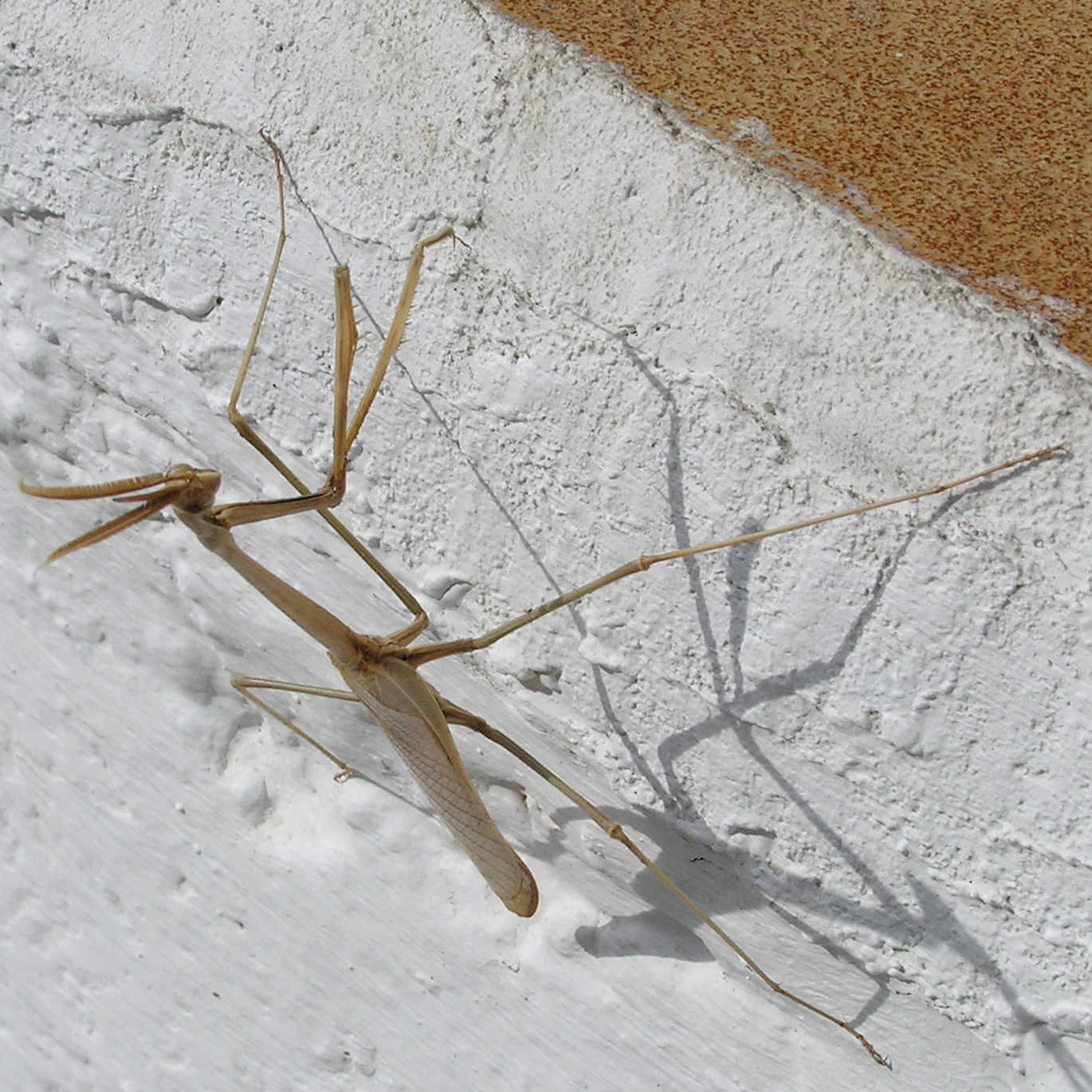 Gottesanbeterin